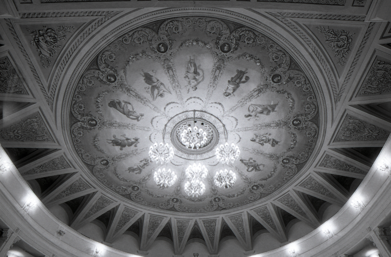 Servizio fotografico : Cervia, 1973 / Paolo Monti. - Strisce: 2, Fotogrammi complessivi: 7 : Negativo b/n, gelatina bromuro d'argento/ pellicola ; 35 mm. - ((Sul portanegativi: N[I]K[MA]T FP4. - Occasione: Campagna di rilevamento (prima) del centro storico. - Fonte: Agenda di Paolo Monti: Leica 1501-3000 Controllo numerazione (1950-1978), presso Archivio Paolo Monti. - Fonte: Fattura di Paolo Monti: Emilia-Romgana centri storici/ Cervia (1973/06/12), presso Archivio Paolo Monti